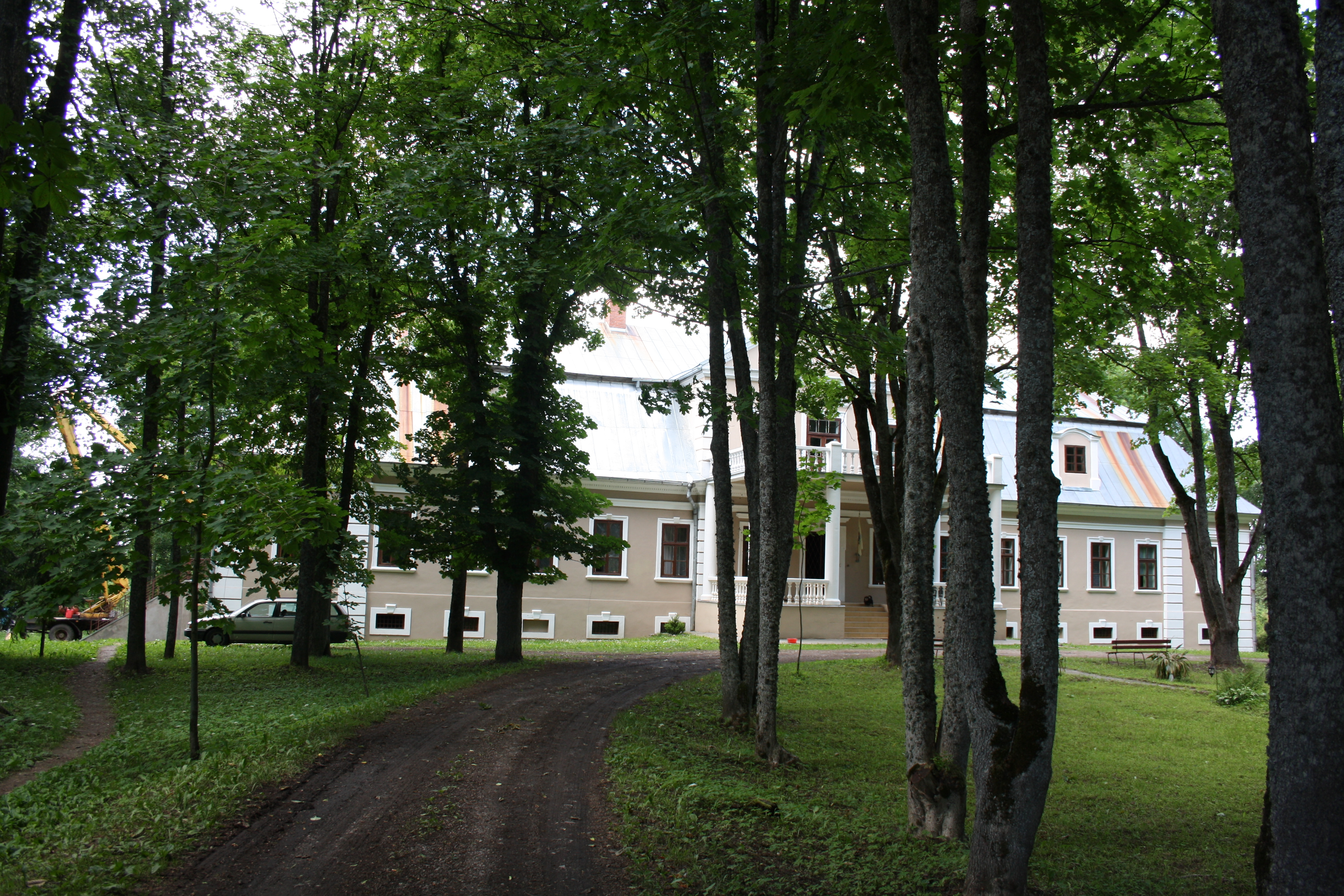 restauruojamas Biliūnų dvaras